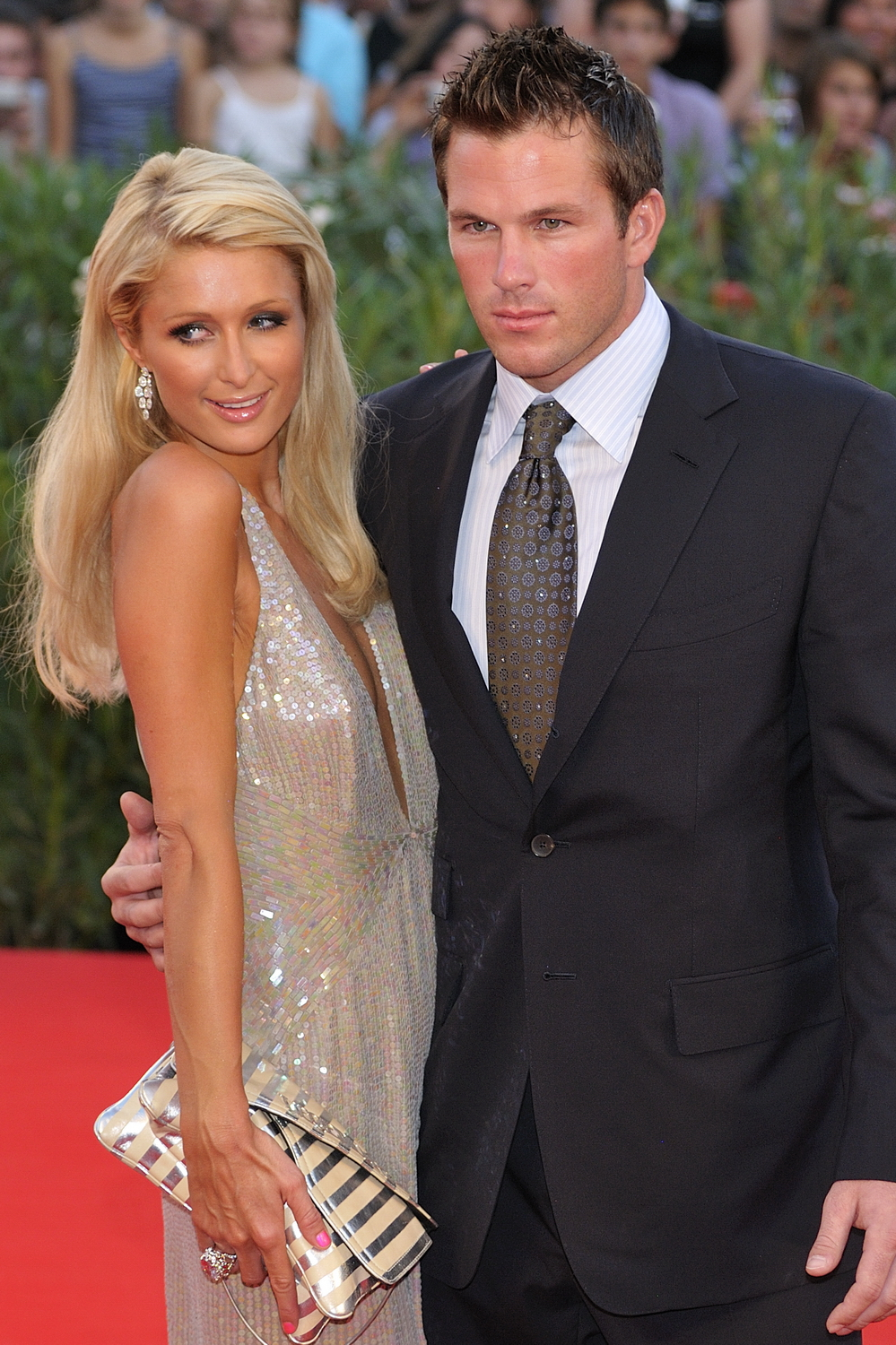 66ème Festival du Cinéma de Venise (Mostra), 3ème jour (04/09/2009) Paris Hilton et Doug Reinhardt lors du Tapis Rouge avec Nicolas Cage, Eva Mendes et le réalisateur Werner Herzog pour le film : Bad Lieutenant : Port of Call New Orleans.